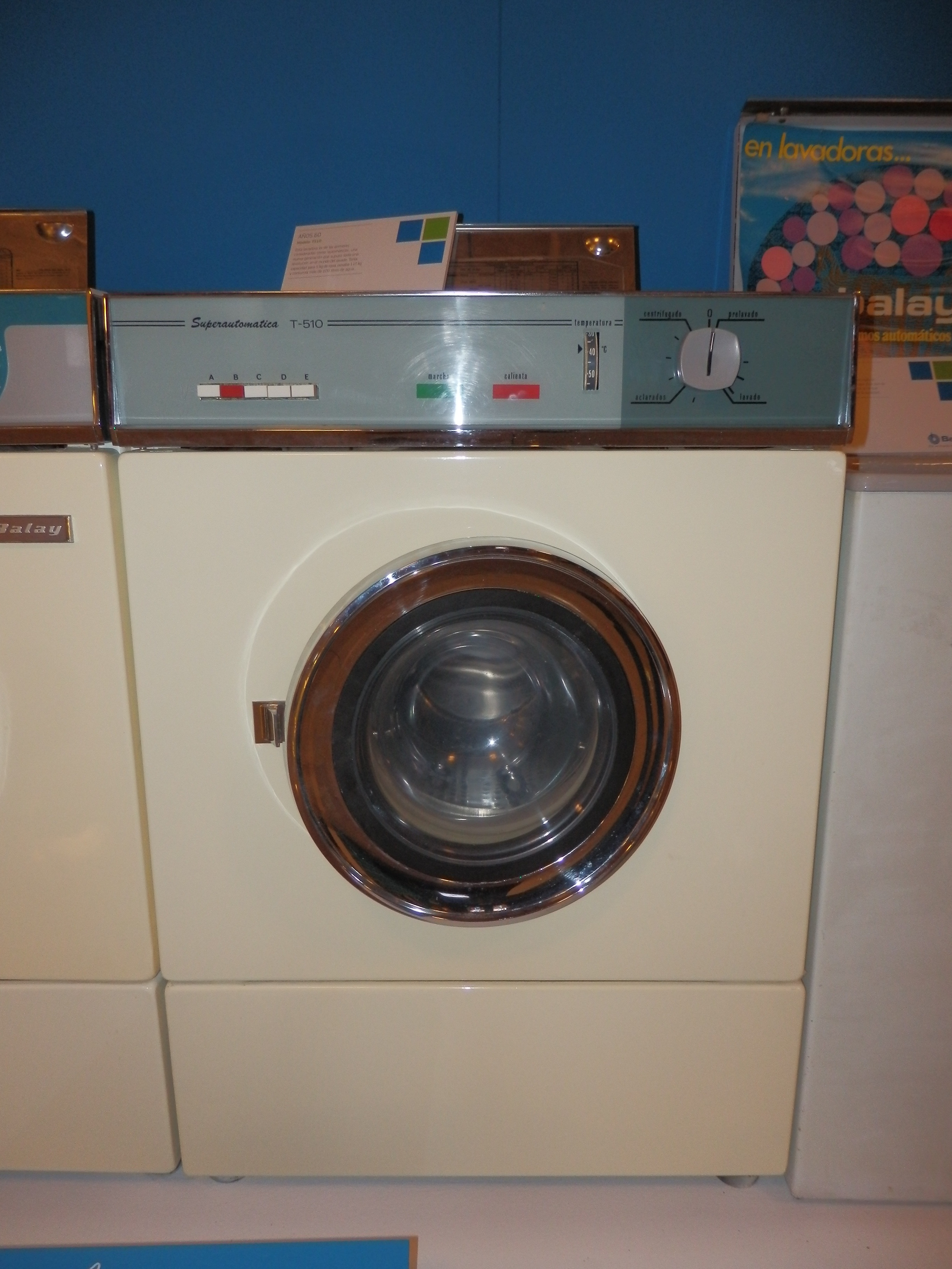 Lavadora Balay T-510. Pesa 100 kg y consume 100 litros en cada lavado. Fabricada hacia 1967.